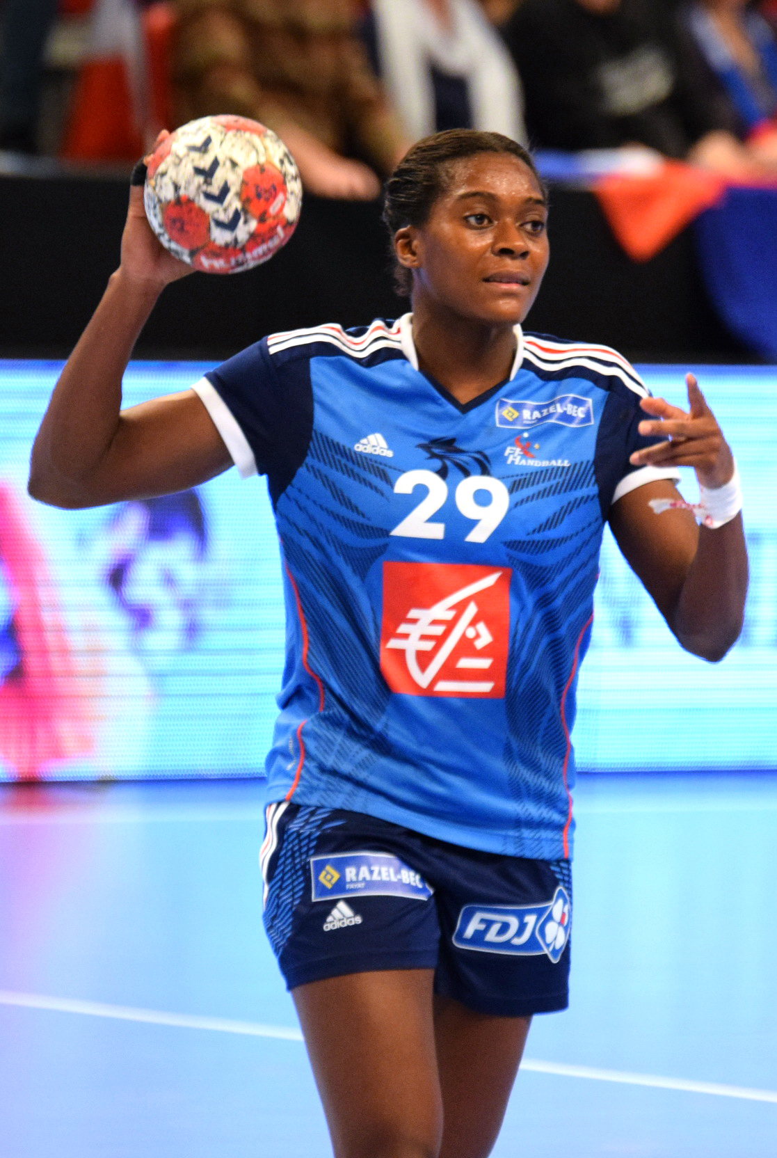 Gnonsiane Niombla Le 29 novembre 2015, lors du match France / République Tchèque pour le compte du TIPIFF 2015. Au stade Pierre de Coubertin à Paris.